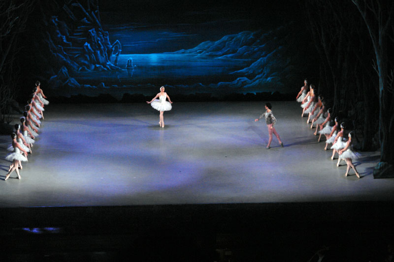 Nino Ananiashvili in Swan Lake ballet